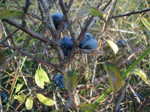 Prunus spinosa